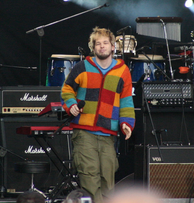 Lider zespołu Hurt w trakcie koncertu "Solidarni z Białorusią" na Placu Zamkowym w Warszawie